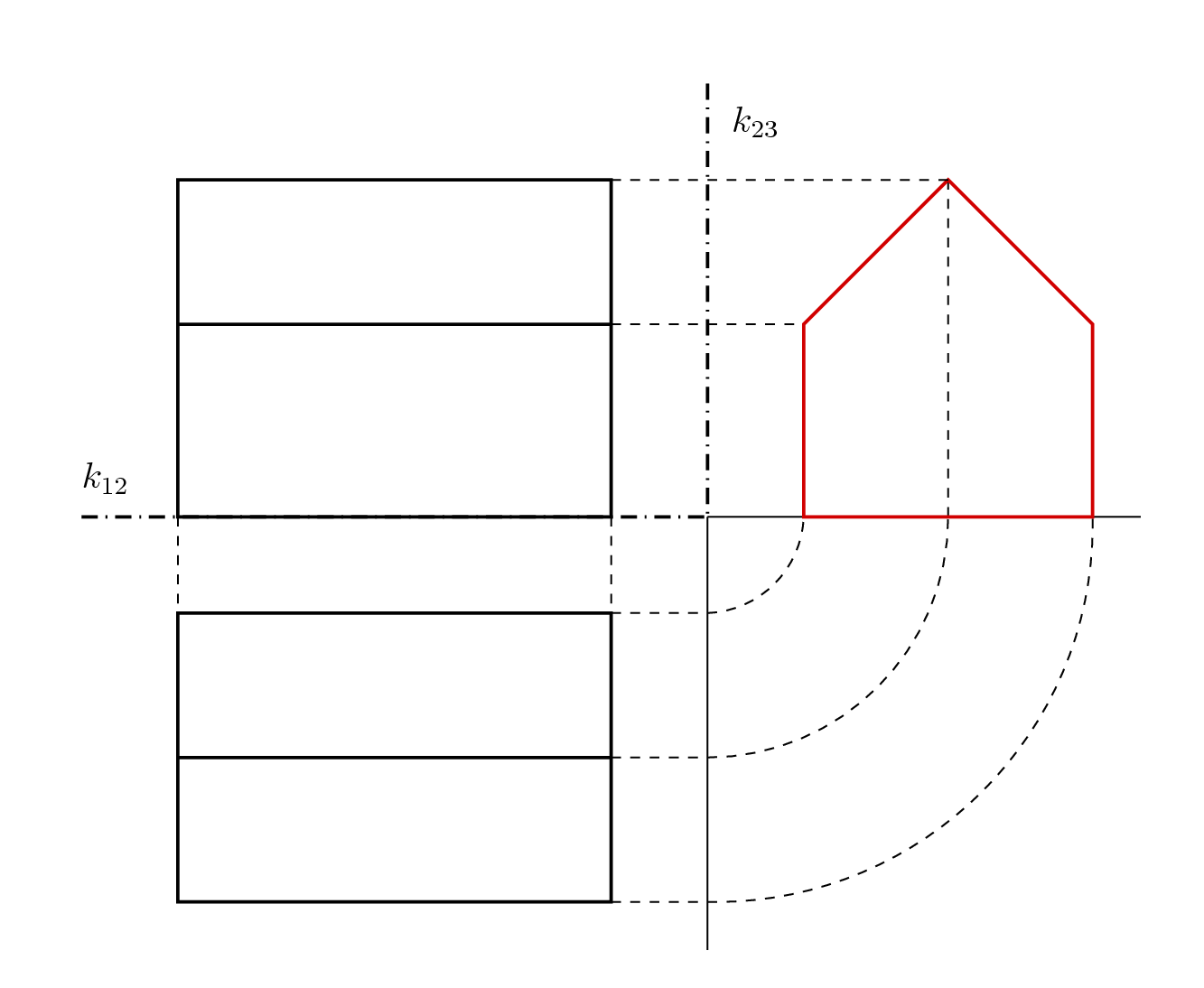 Zweitafelprojektion: Kreuzriss